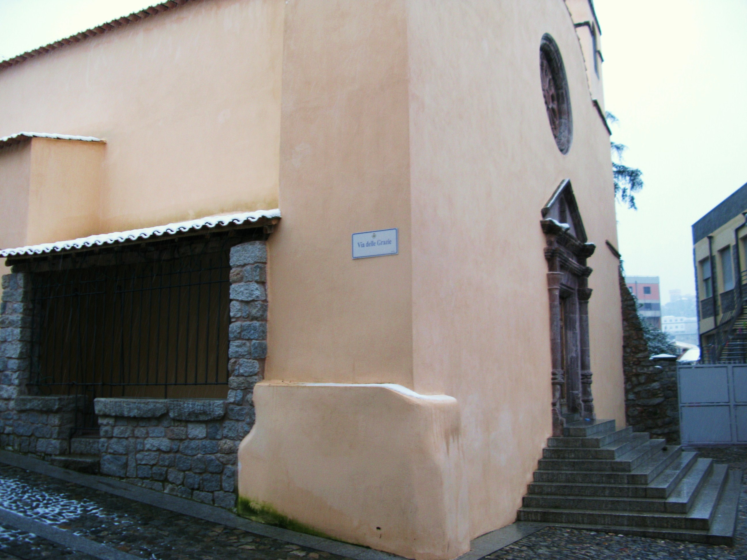 Nuoro - Antico Santuario di Nostra Signora delle Grazie - Veduta laterale